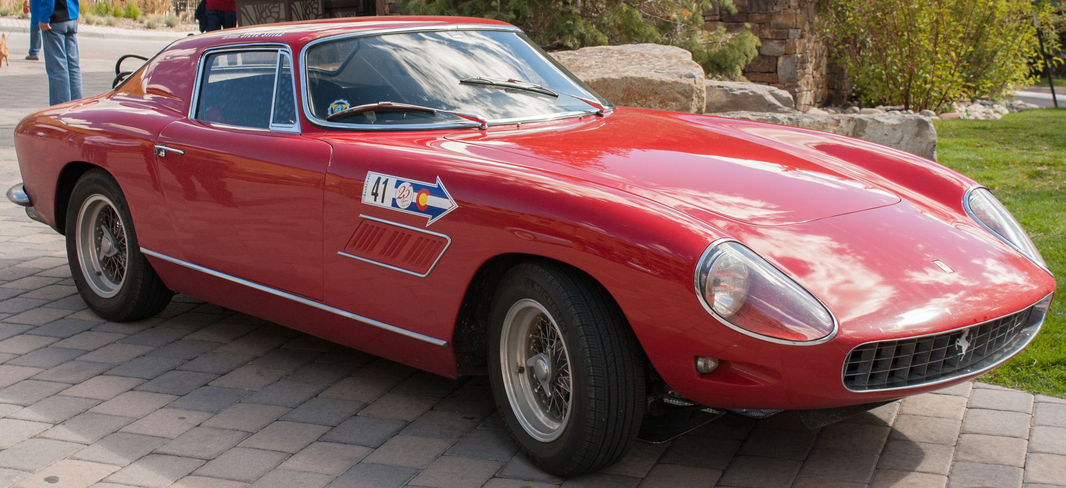 1958 Ferrari 250GT Drogo